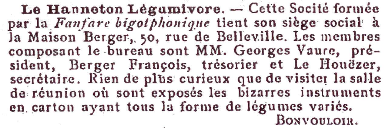 A propos d'une société bigophonique parisienne.